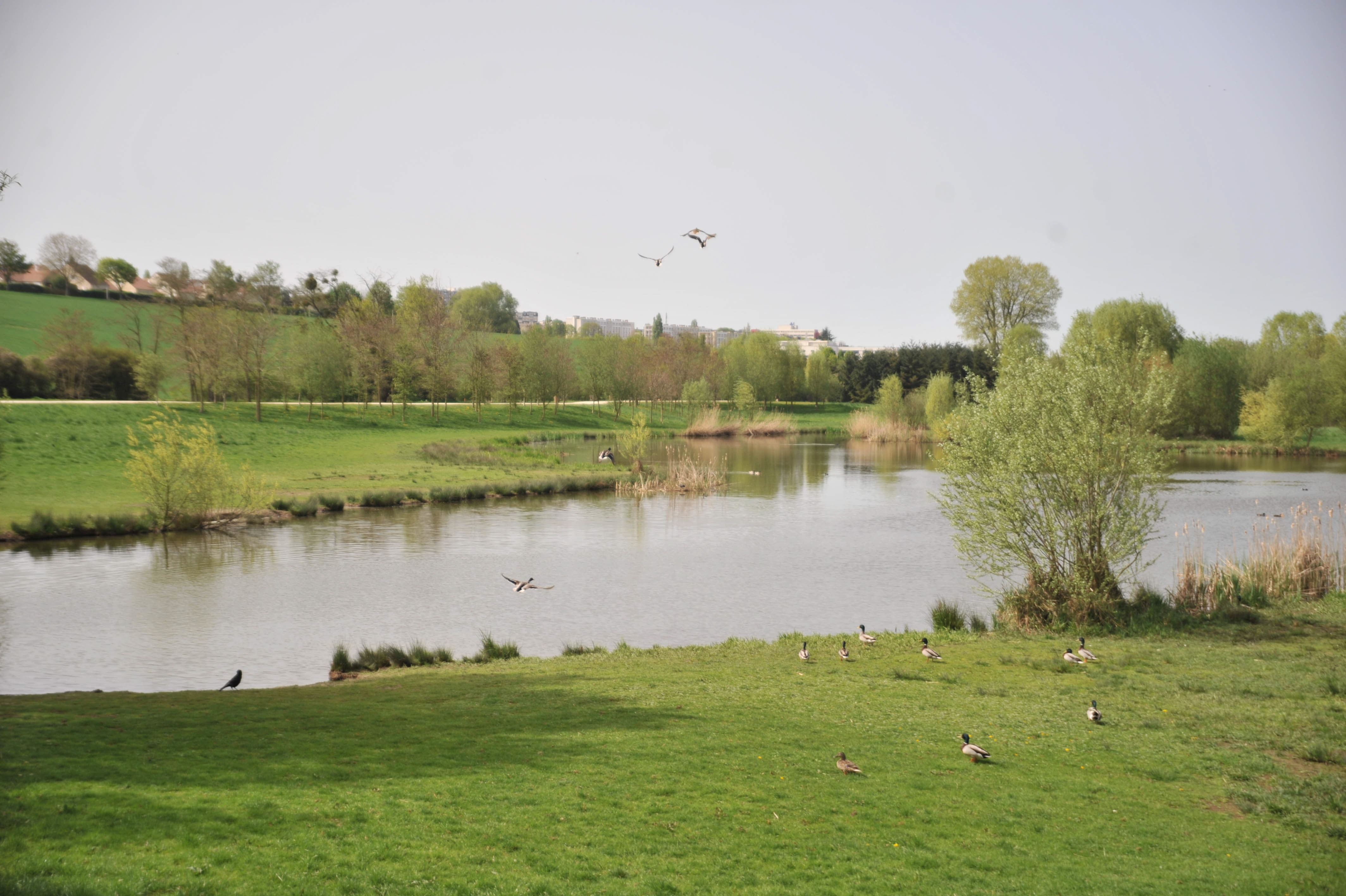 Parc Vert de Longjumeau